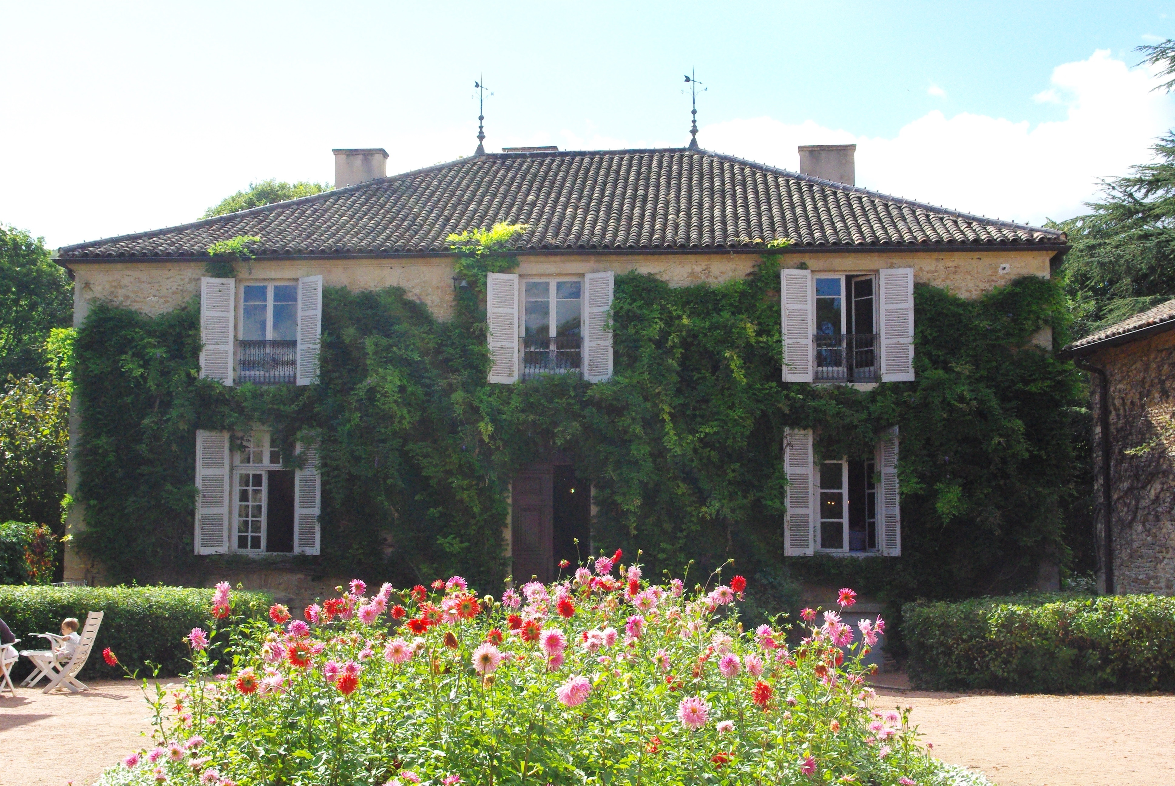 Maison natale de Lamartine à Milly-Lamartine (71)